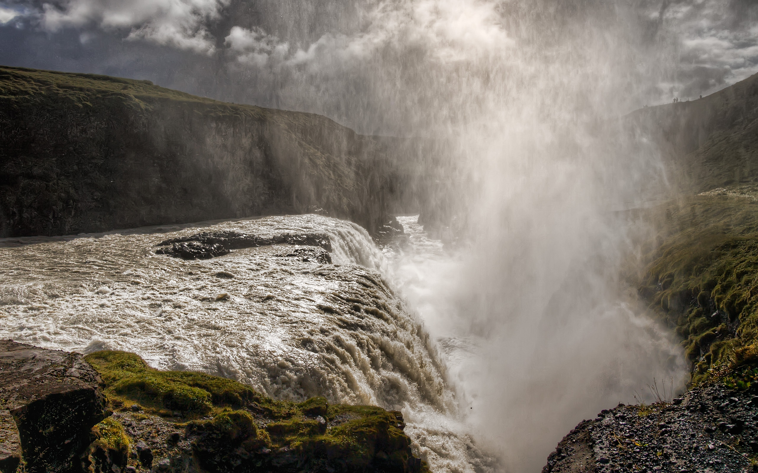 Hvítá, Iceland